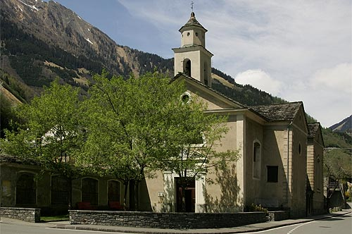 Mesocco: Chiesa San Rocco